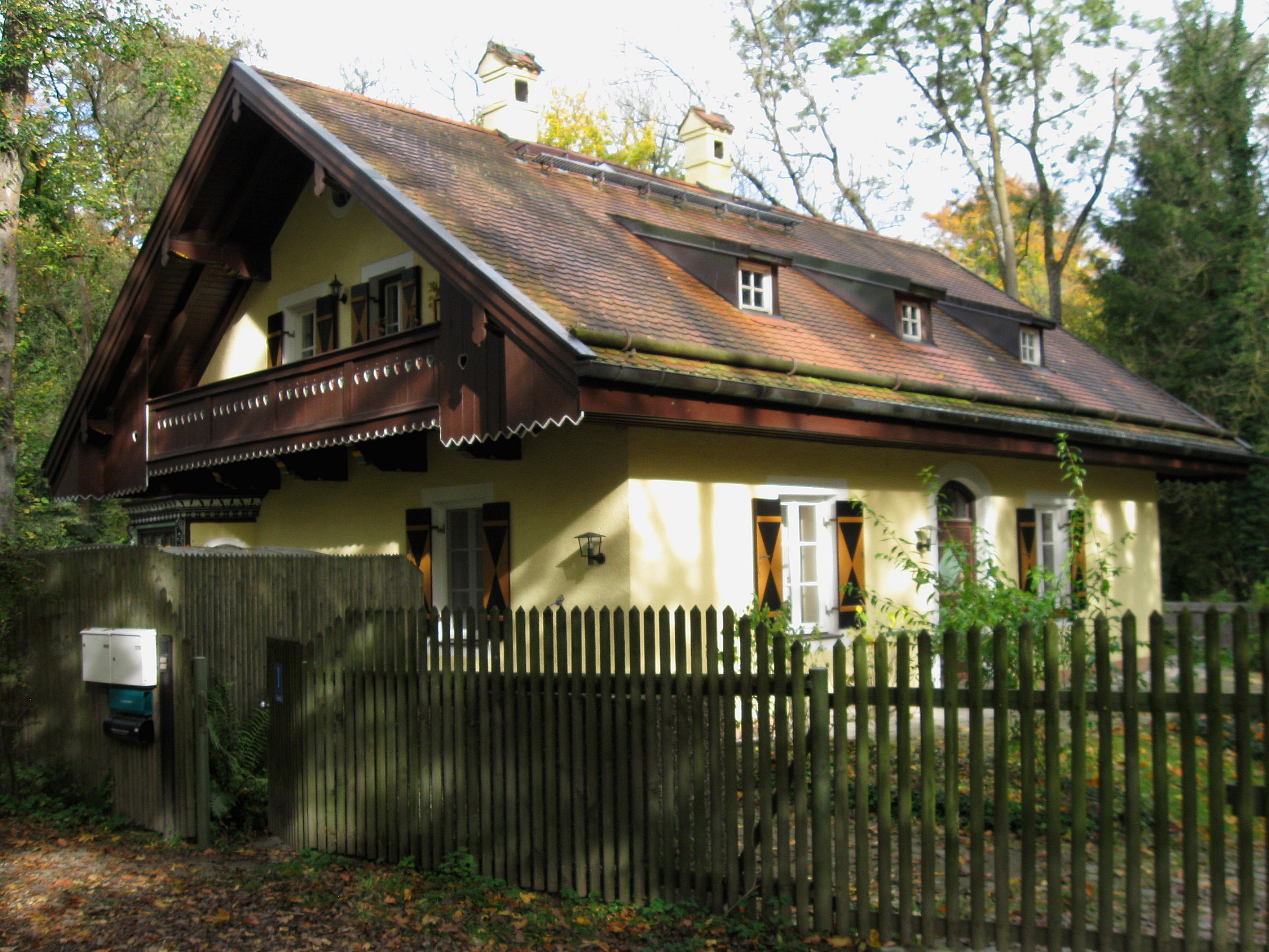 Hinterbrühl 1; Ehem. Schleusenwärterhaus, Landhausstil, 1899; am Hinterbrühler See.